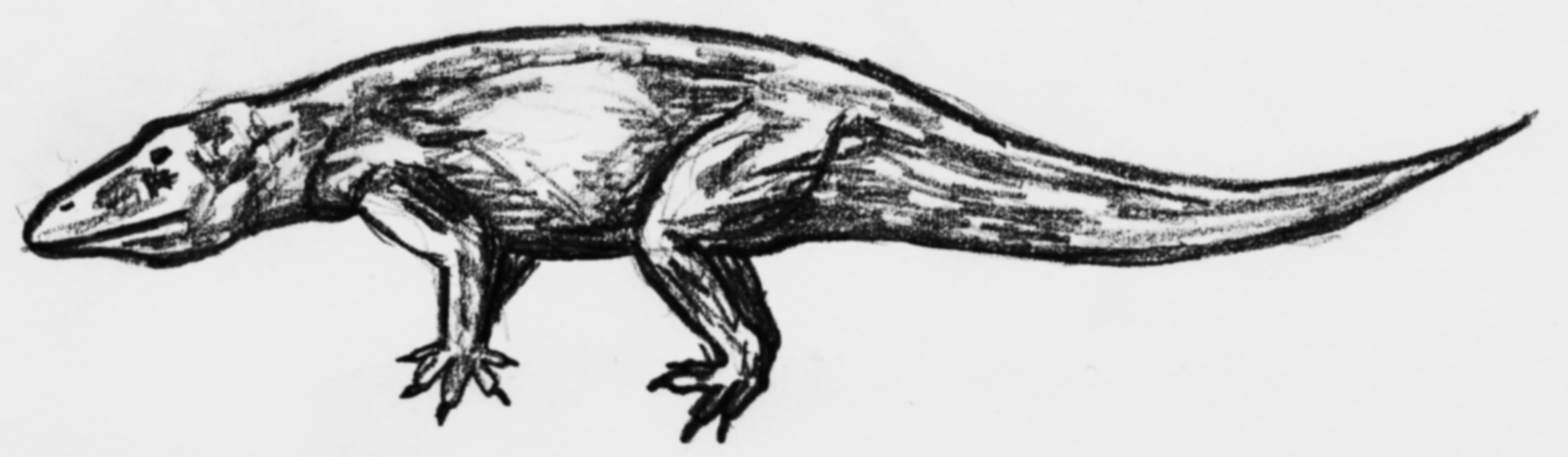 Zeichnung des Riesenwarans Megalania (Varanus Priscus btzw. Megalania Prisca)